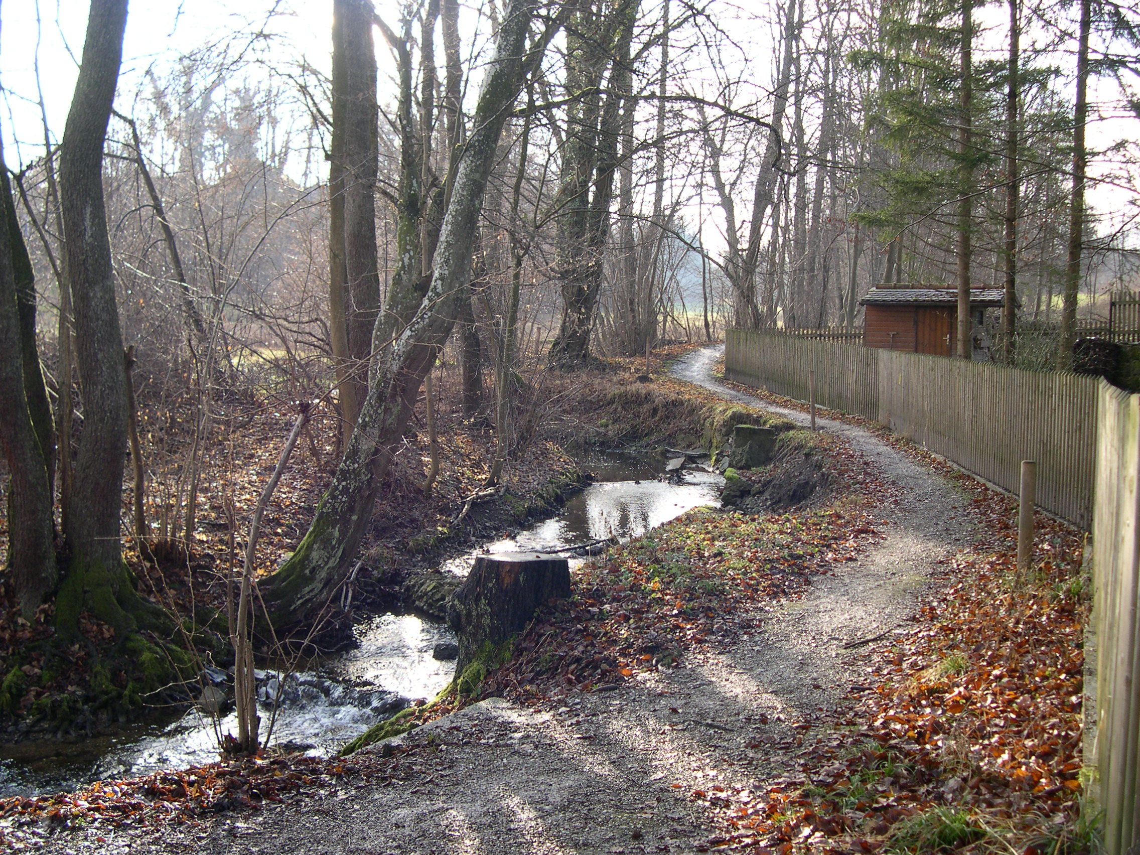 Mühlbach im Tal des Lebens in Utting am Ammersee